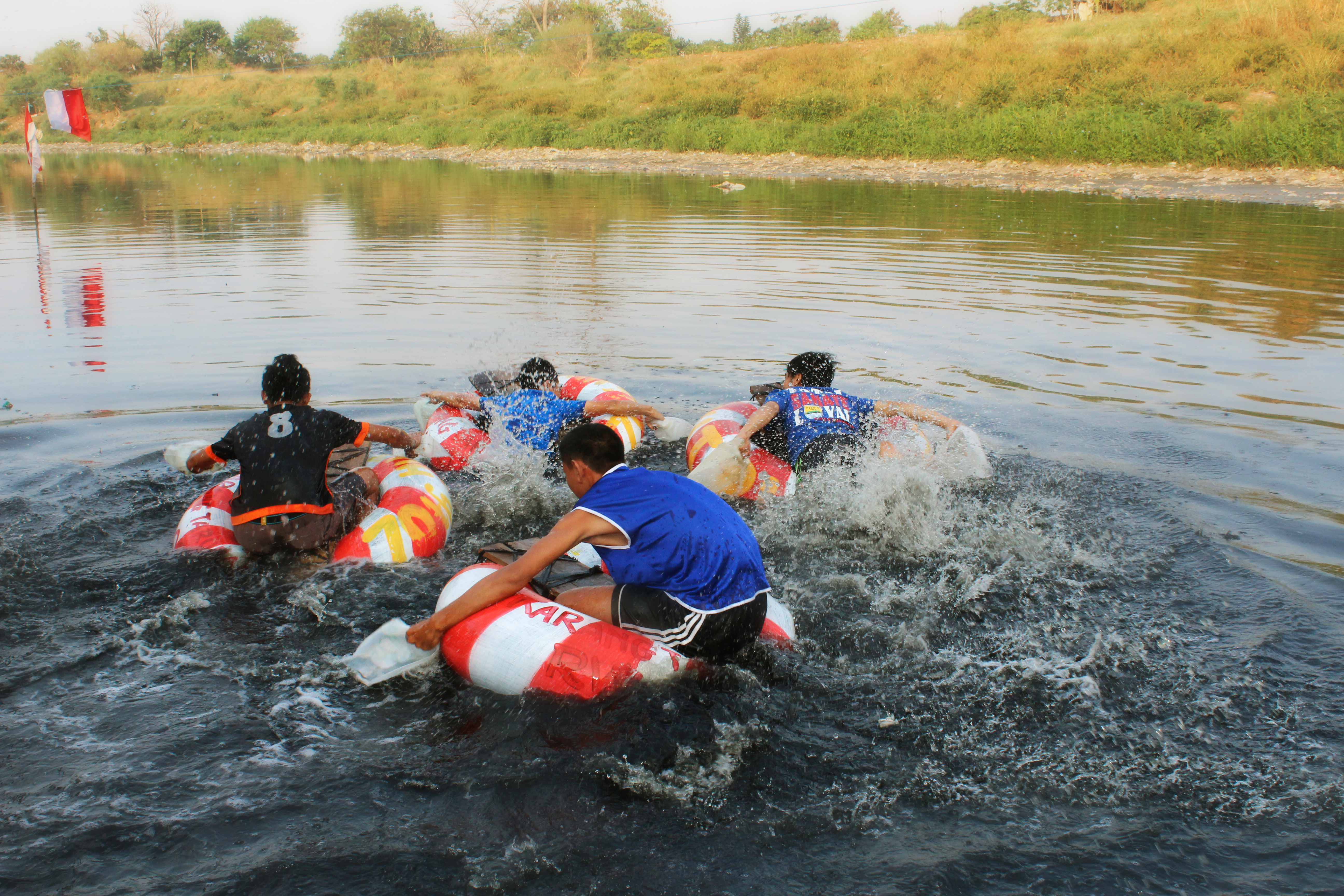 Keseruan Permaianan Masyarakat memamfaatkan sungai citarum untuk Balapan Ban Air terbilang unik biasanya memakai perahu tapi kali ini dilakukan dengan mendayuh ban serta peralatan sederhana bukan hanya mental tapi fisik juga harus kuat. Lomba ini hanya ada di lokasi yang dekat dengan sungai citarum tepatnya diadakan di Citarum Bojongbuah Desa Pangauban Kabupaten Bandung. Dirgahayu R.I ke 70 Th Dokumentasi Foto pada tanggal 16 Agustus 2015